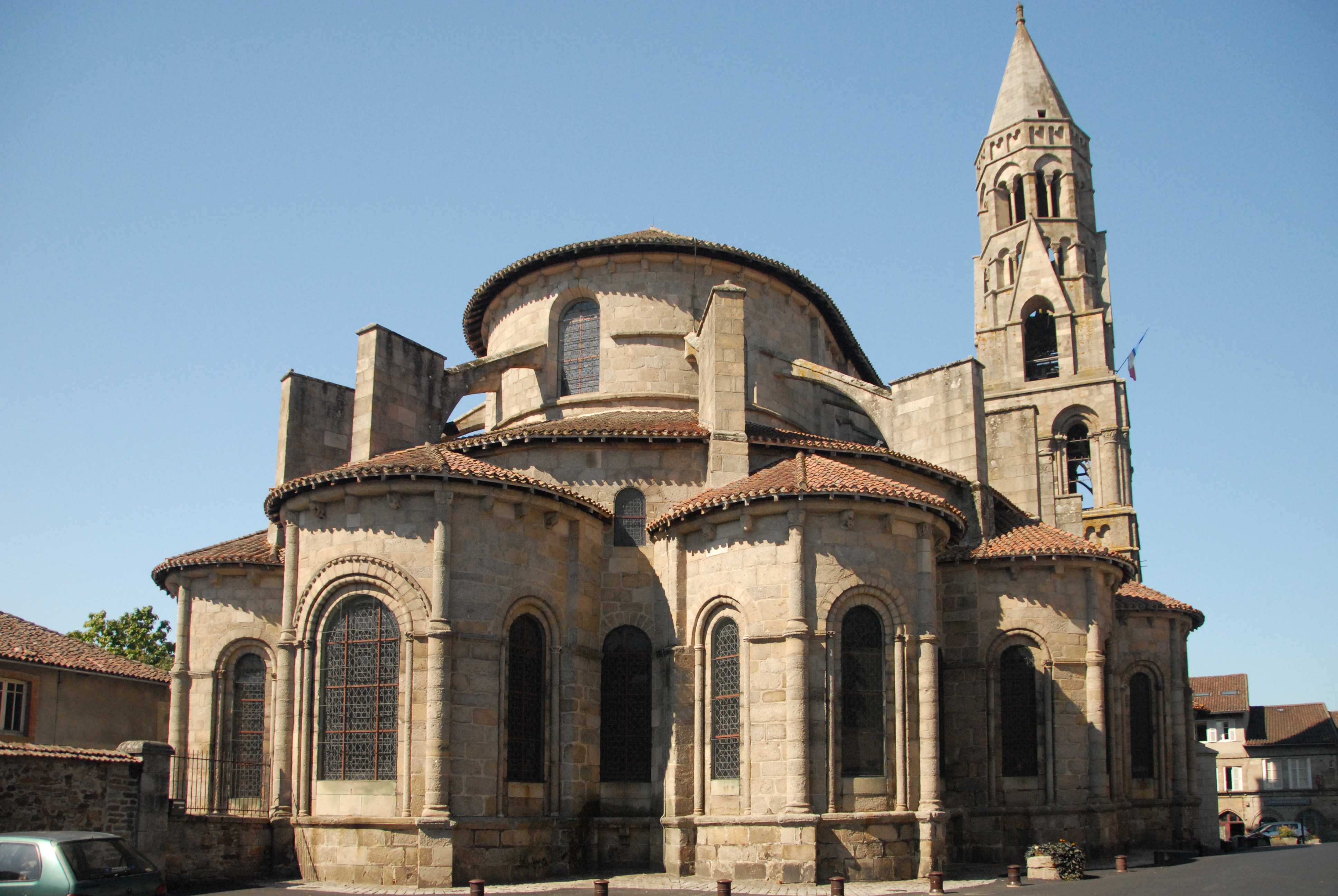 Stiftskirche St.-Léonard-de-Noblat, von O, Chorhaupt u. Turm